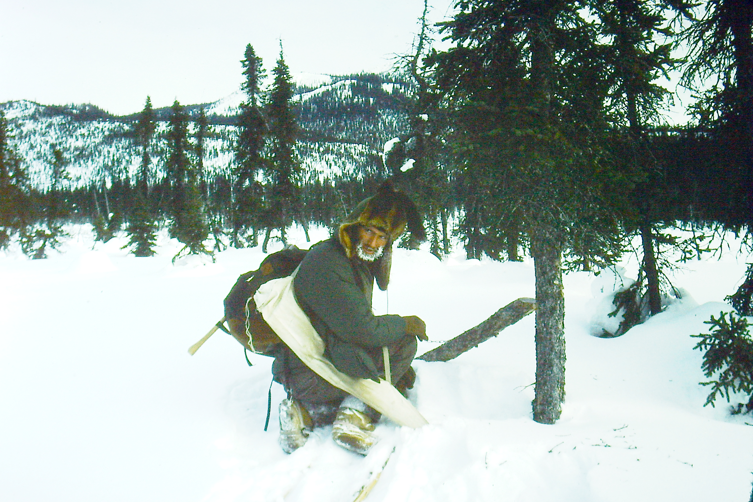 Einrichten einer Zobelfalle.